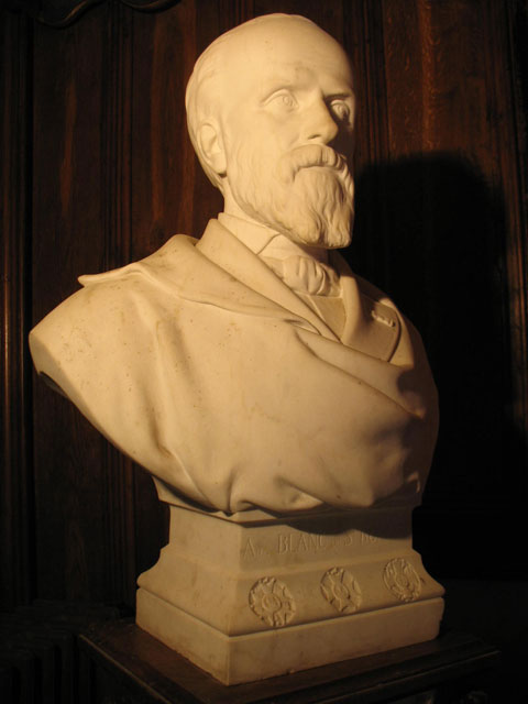 Buste du philosophe lyonnais Antoine Blanc de Saint-Bonnet (1815-1880).